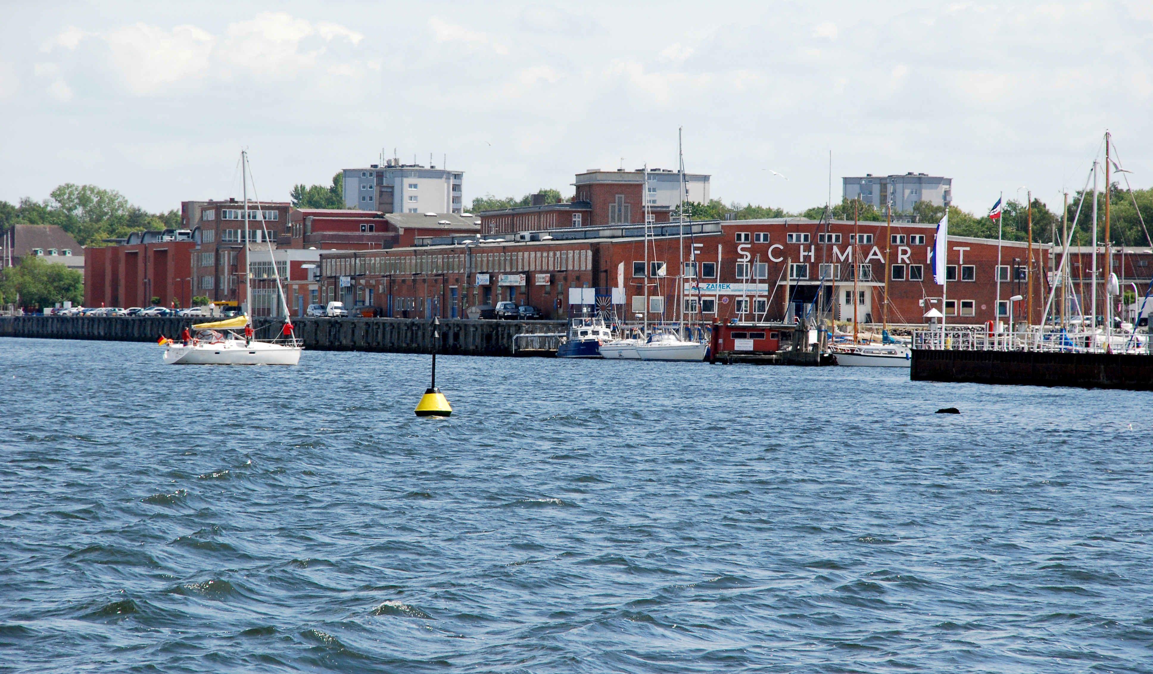 Seefischmarkt in Kiel-Wellingdorf, im hinteren Bereich an der Pier sind die Gebäude von IFM-GEOMAR (fotografiert von der Schwentine-Fähre aus)